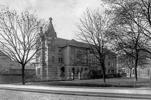 Ehemalige Synagoge in Göttingen